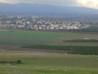 הכפר מנשיה זבדיה מבט לכיוון מערב מתל שמרון. הכפר שוכן בעמק יזרעאל